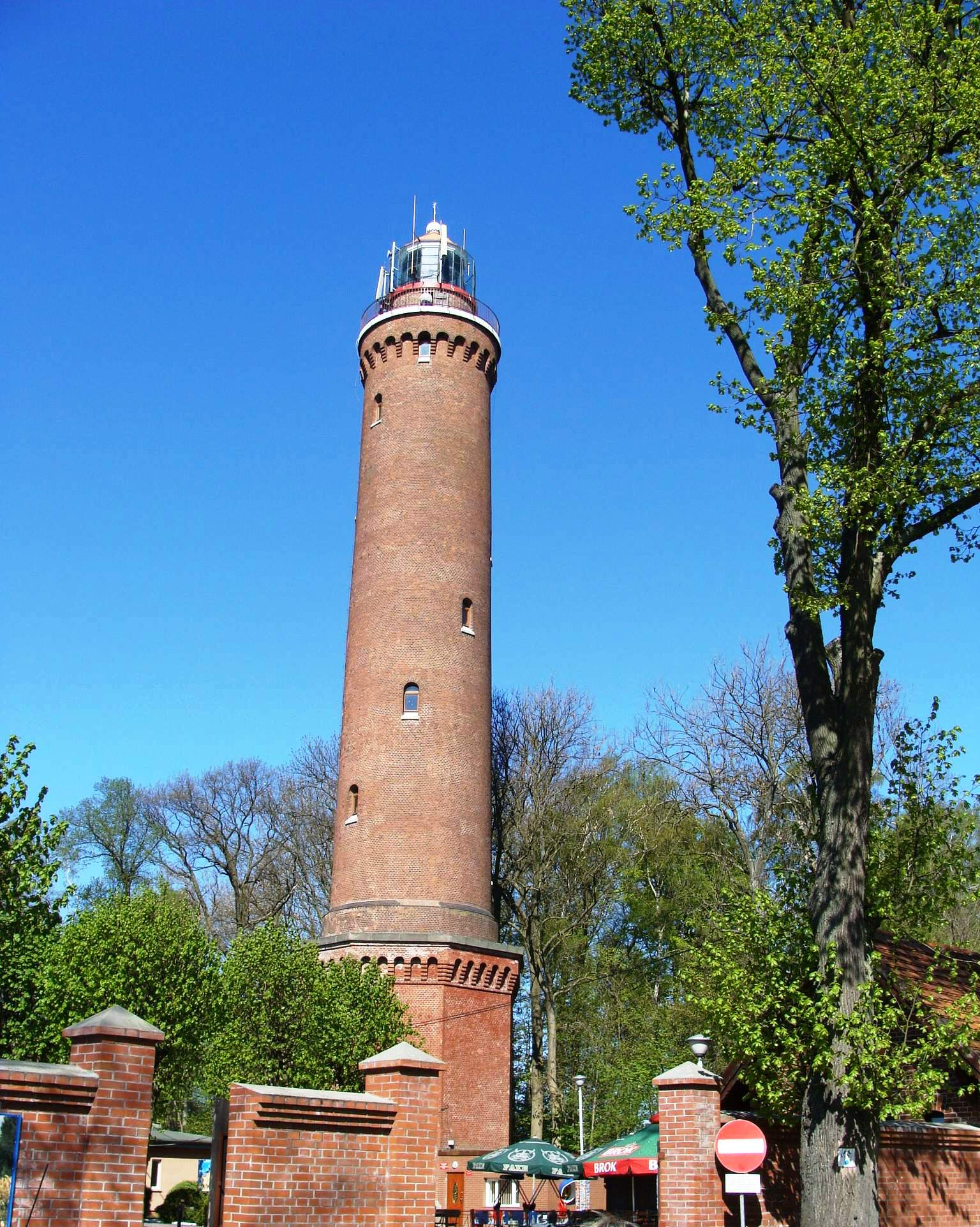 Gąski, latarnia morska, 1876-1878